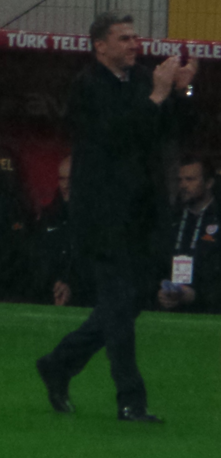 Hamzaoğlu 2013-14 sezonunda Galatasaray tribünlerini selamlarken